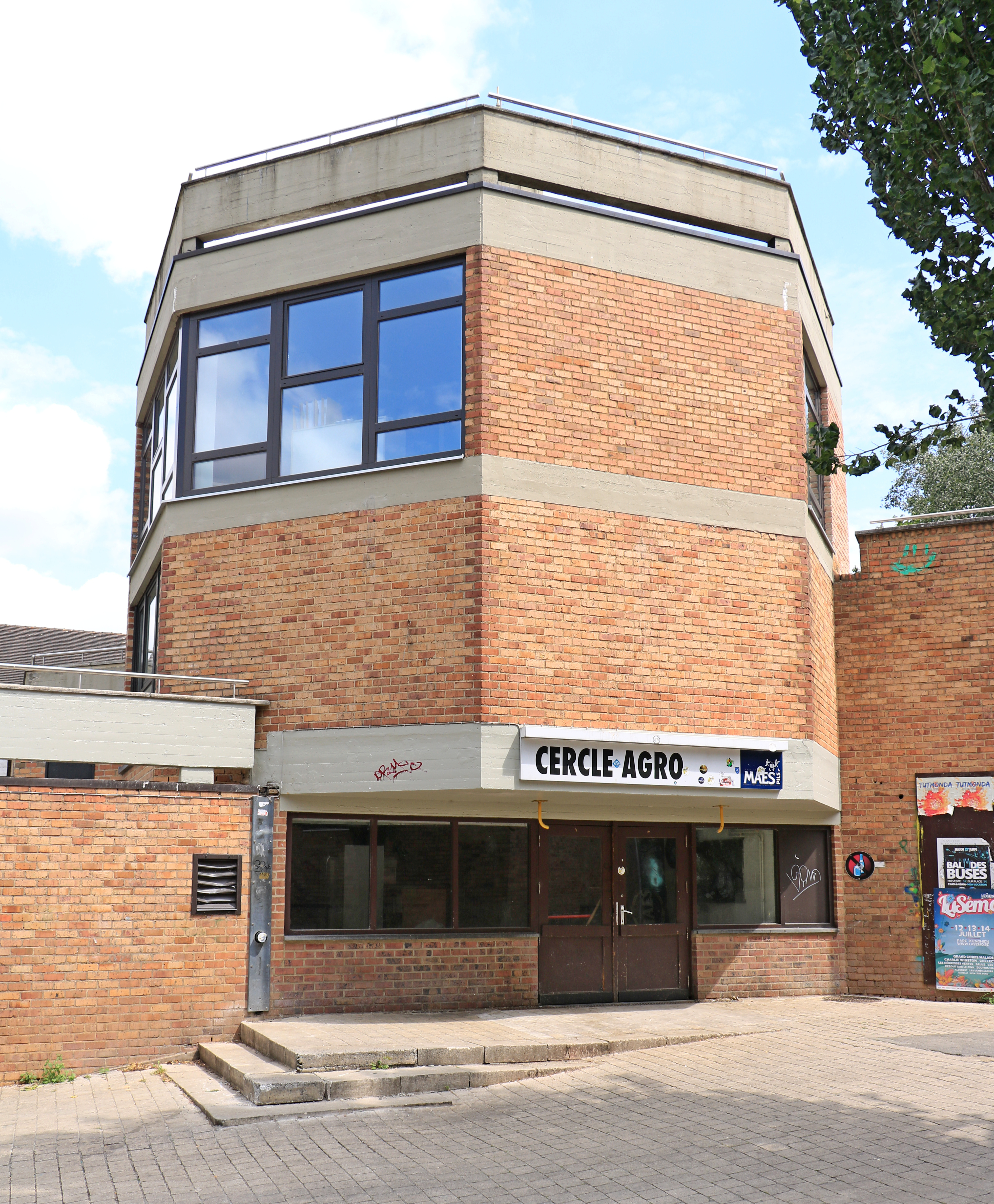 Belgique - Louvain-la-Neuve - Place Galilée - Cercle Agro (Cercle des étudiants de la Faculté des bioingénieurs)